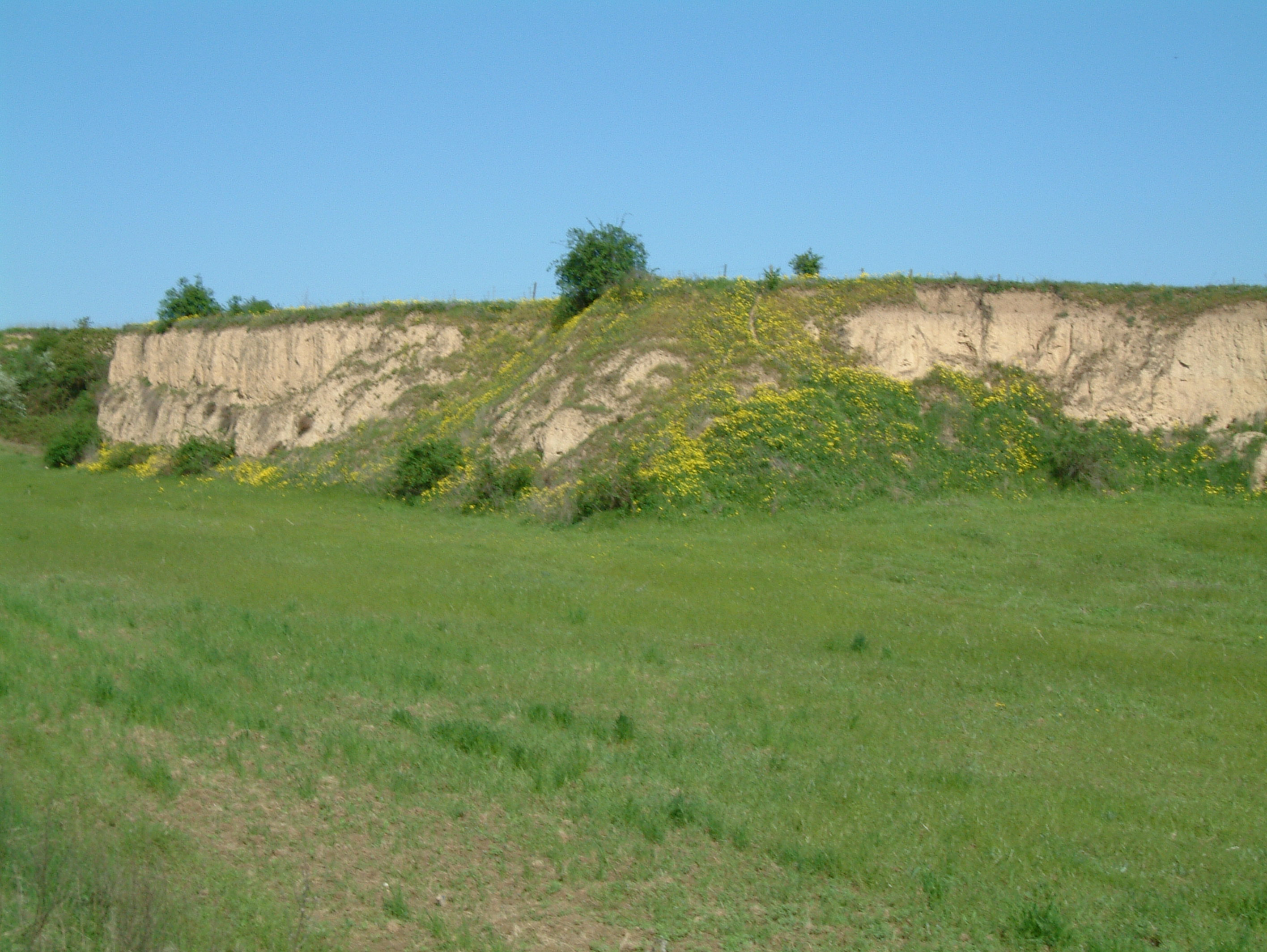 Naturdenkmal Lösswand zu Dirmstein